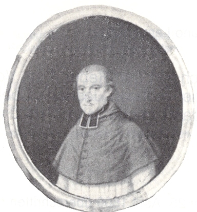 Euchar_Adam_(1748-1830),_Domdechant_in_Eichstätt